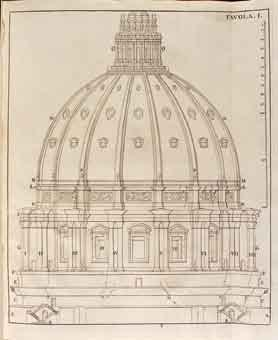 Giovanni POLENI, 1683-1761, Memorie istoriche della gran cupola del Tempio Vaticano, e de' danni di essa, e de' ristoramenti loro, divise in libri cinque... In Padova: nella stamperia del Seminario, MDCCXLVIII [1748].